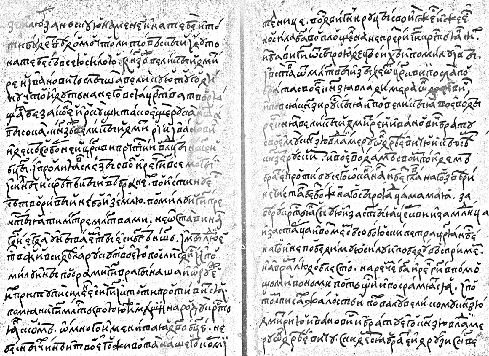 Лл. 214 об. и 215 из "Задонщины" по списку ГИМ № 2060 (из Музейского собрания). Воспроизводится по изданию Яна Фрчека (1948).